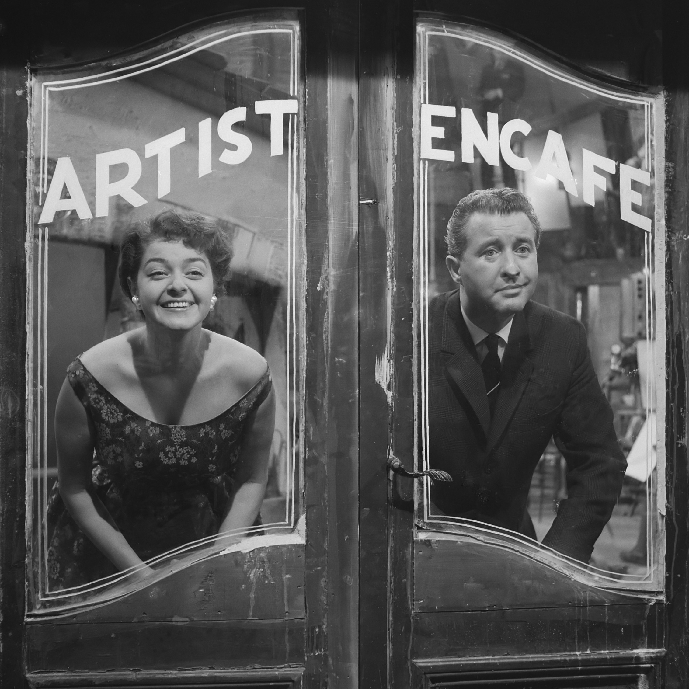 Artistencafe Teddy en Henk Scholten 6 december 1959